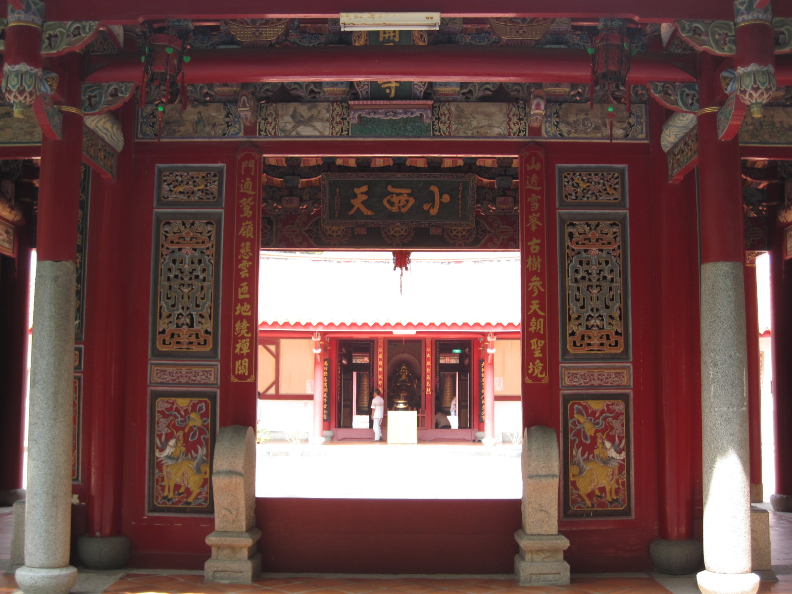 臺南開元寺三川門近景